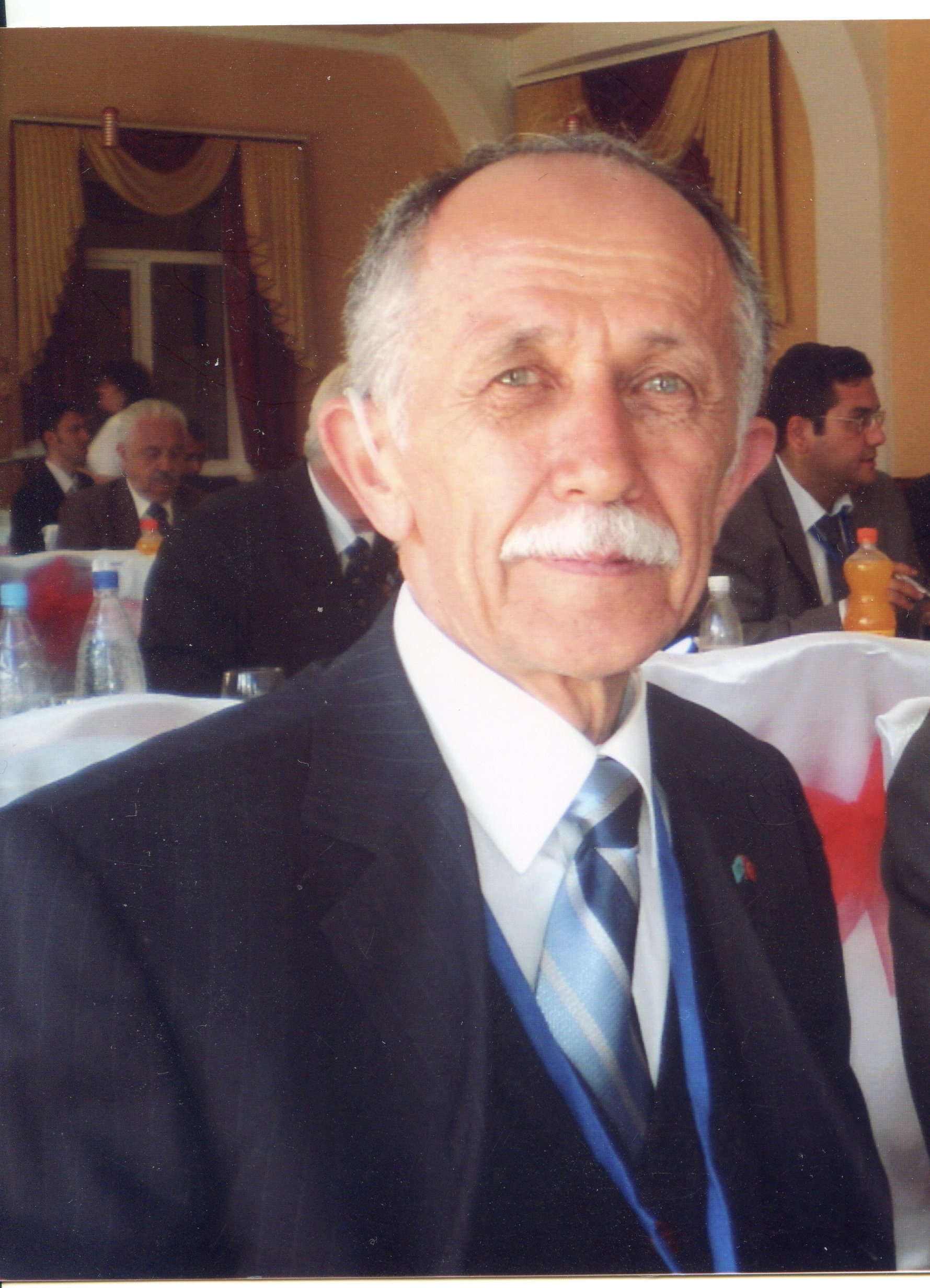 Qırımtatarca: Saim Osman Qarahan